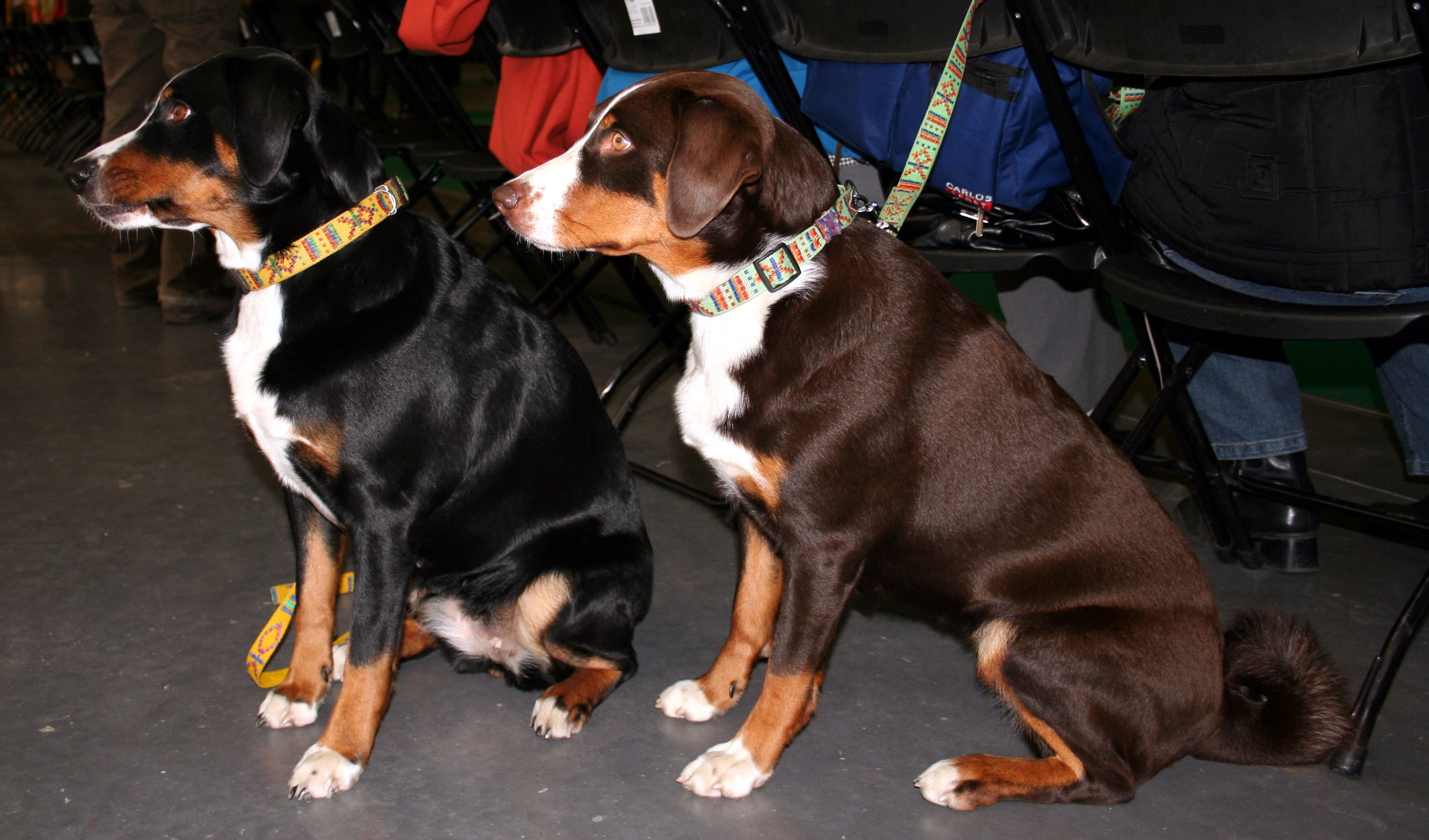 Appenzeller na Światowej Wystawie Psów Rasowych w Poznaniu